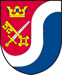 znak-slapy, okres Praha-západ